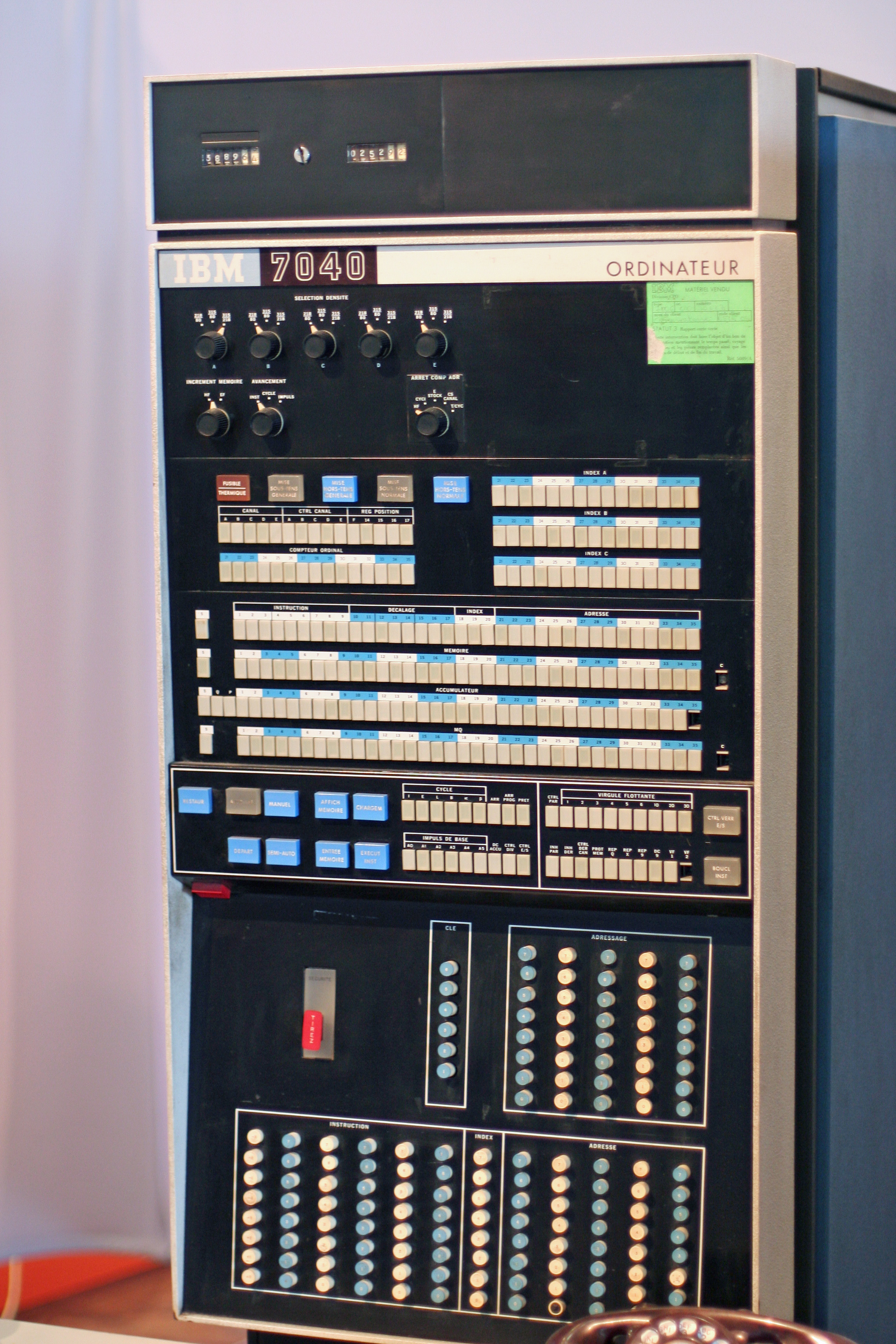 Front panel of an IBM 7040 computer on exhibit at the Musée de l'informatique.